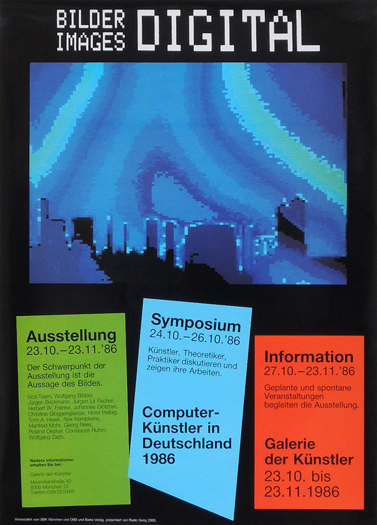 Plakat der Ausstellung "Bilder Images Digital", 1986, Galerie der Künstler, München. Copyright by Alex Kempkens, Titel "Landscape 1".